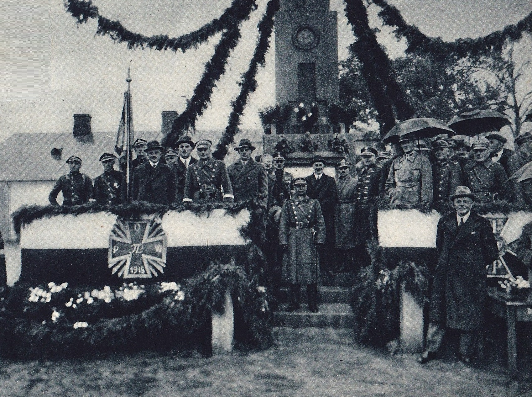 Piękną tę uroczystość uświetnili swoją obecnością pp. wojewoda białostocki Marian Zyndram – Kościałkowski i gen. Czesław Młot – Fijałkowski, którzy następnie przyjmowali defiladę miejscowego oddziału P.O.W. Widoczny jest również starosta powiatowy wysokomazowiecki Adam Demidecki – Demidowicz.